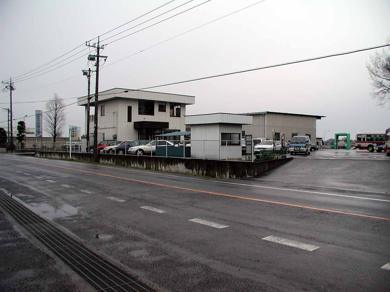 Toya Kotsu Bus Moka Dept. 東野交通真岡営業所（撮影当時、現在は出張所降格）